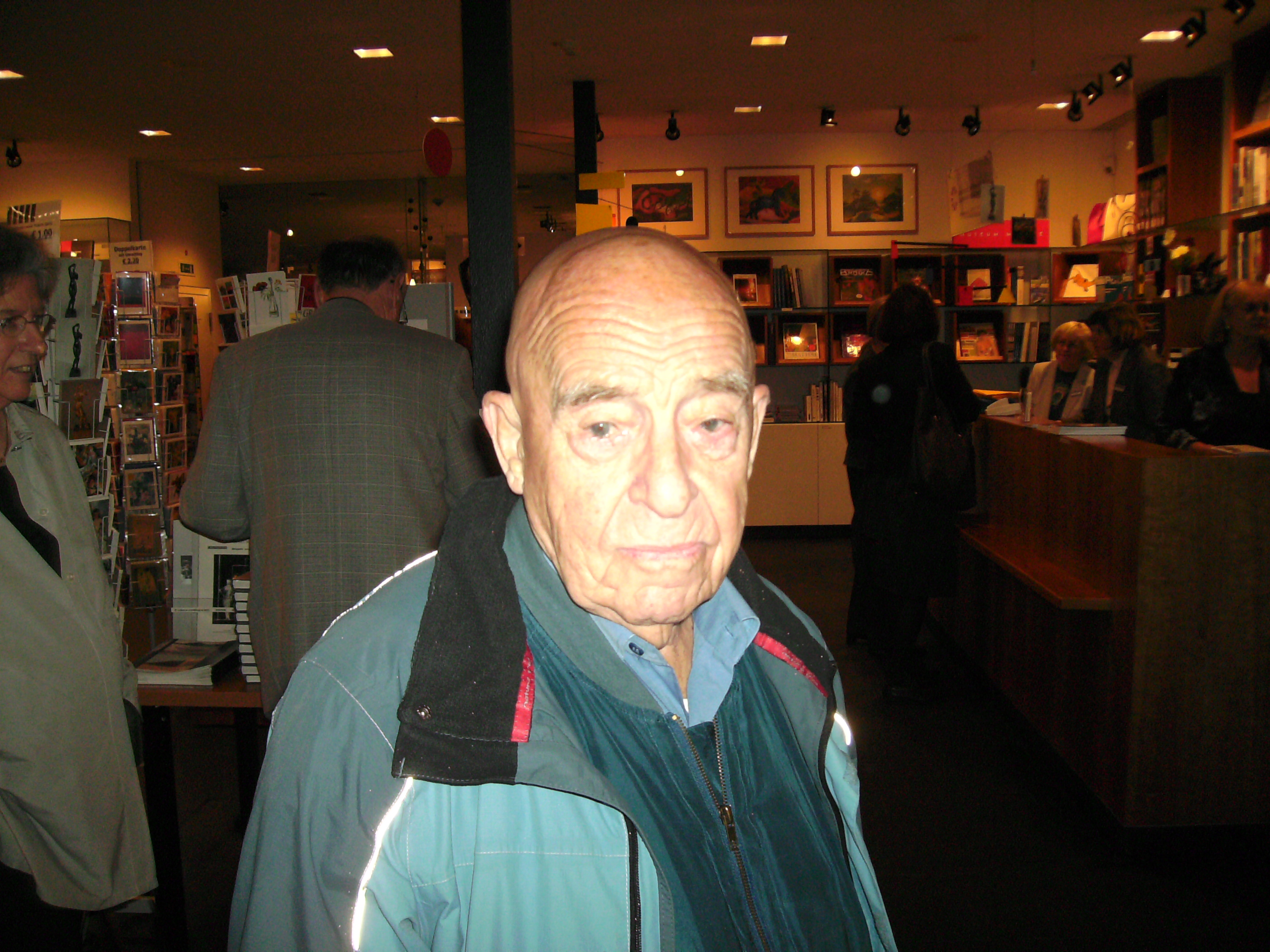 Portrait Manfred Güthler